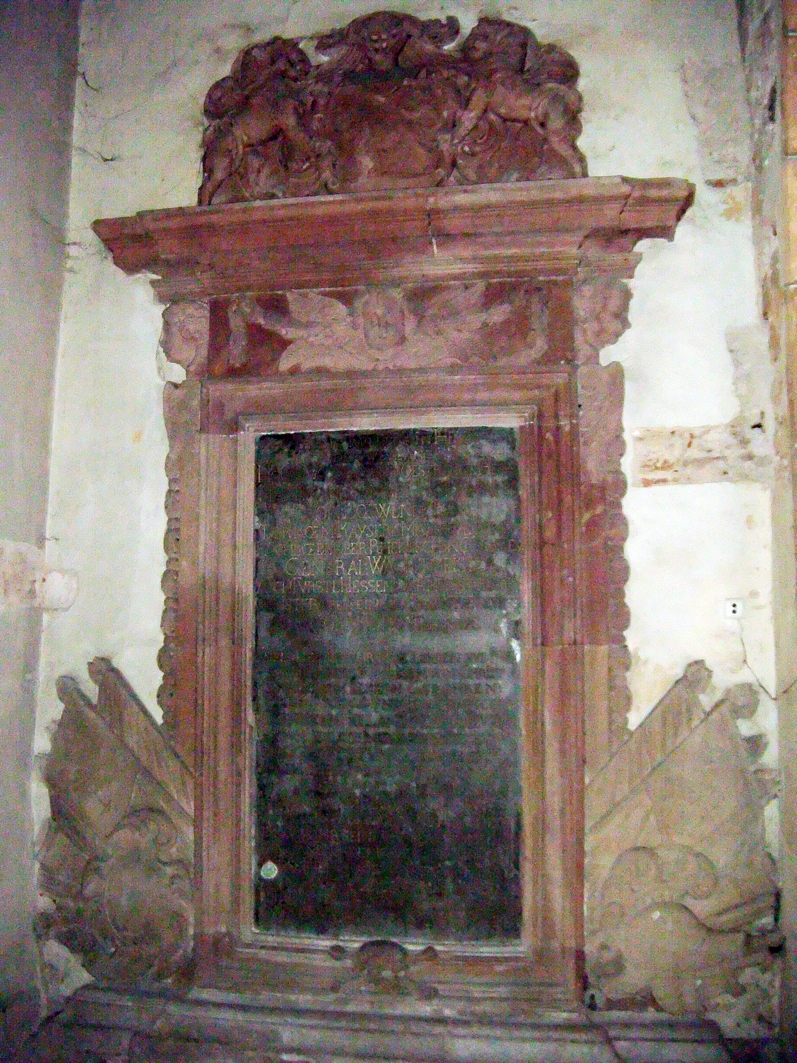 Landau in der Pfalz, Katharinenkapelle, Grabmal des Generals Hartmann Samuel Hoffmann von Löwenfeld (1653-1709)